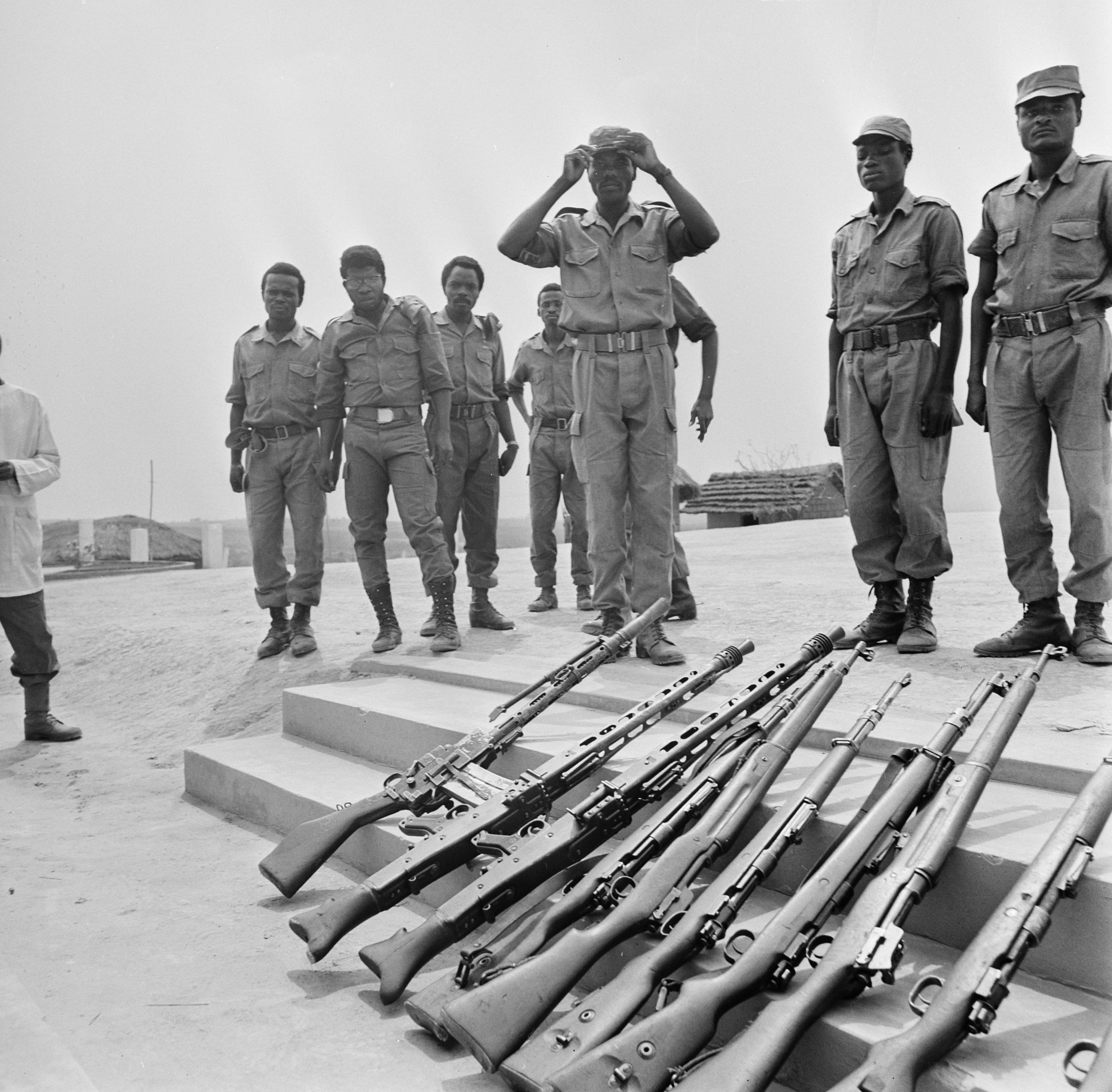 Collectie / Archief : Fotocollectie Anefo Reportage / Serie : [ onbekend ] Beschrijving : Kamp van Angolese Bevrijdingsbeweging FNLA in Zaire, leden bevrijdingsbeweging in het kamp Datum : 22 augustus 1973 Locatie : Zaïre Trefwoorden : Bevrijdingsbewegingen, kampen, leden Persoonsnaam : FNLA Fotograaf : Mieremet, Rob / Anefo Auteursrechthebbende : Nationaal Archief Materiaalsoort : Negatief (zwart/wit) Nummer archiefinventaris : bekijk toegang 2.24.01.03 Bestanddeelnummer : 926-6277